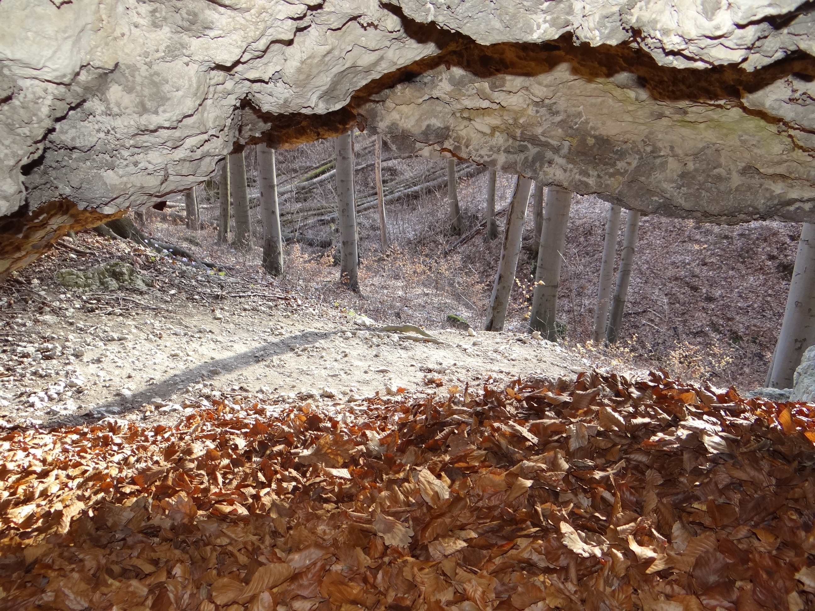 Schronisko Żarskie II w Dolinie Racławki